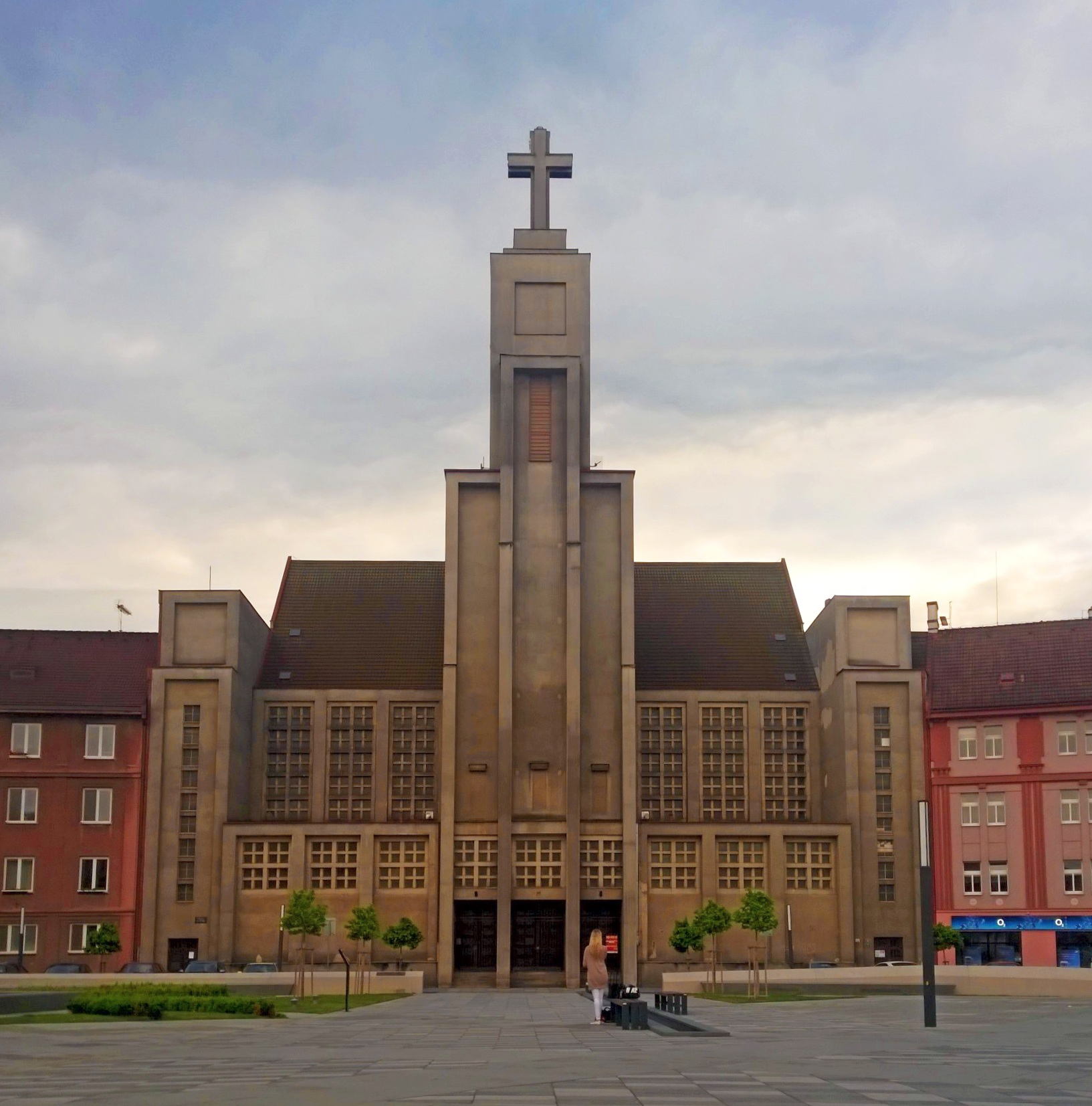 Kostel Božského srdce Páně v Hradci Králové, Náměstí 28. října.